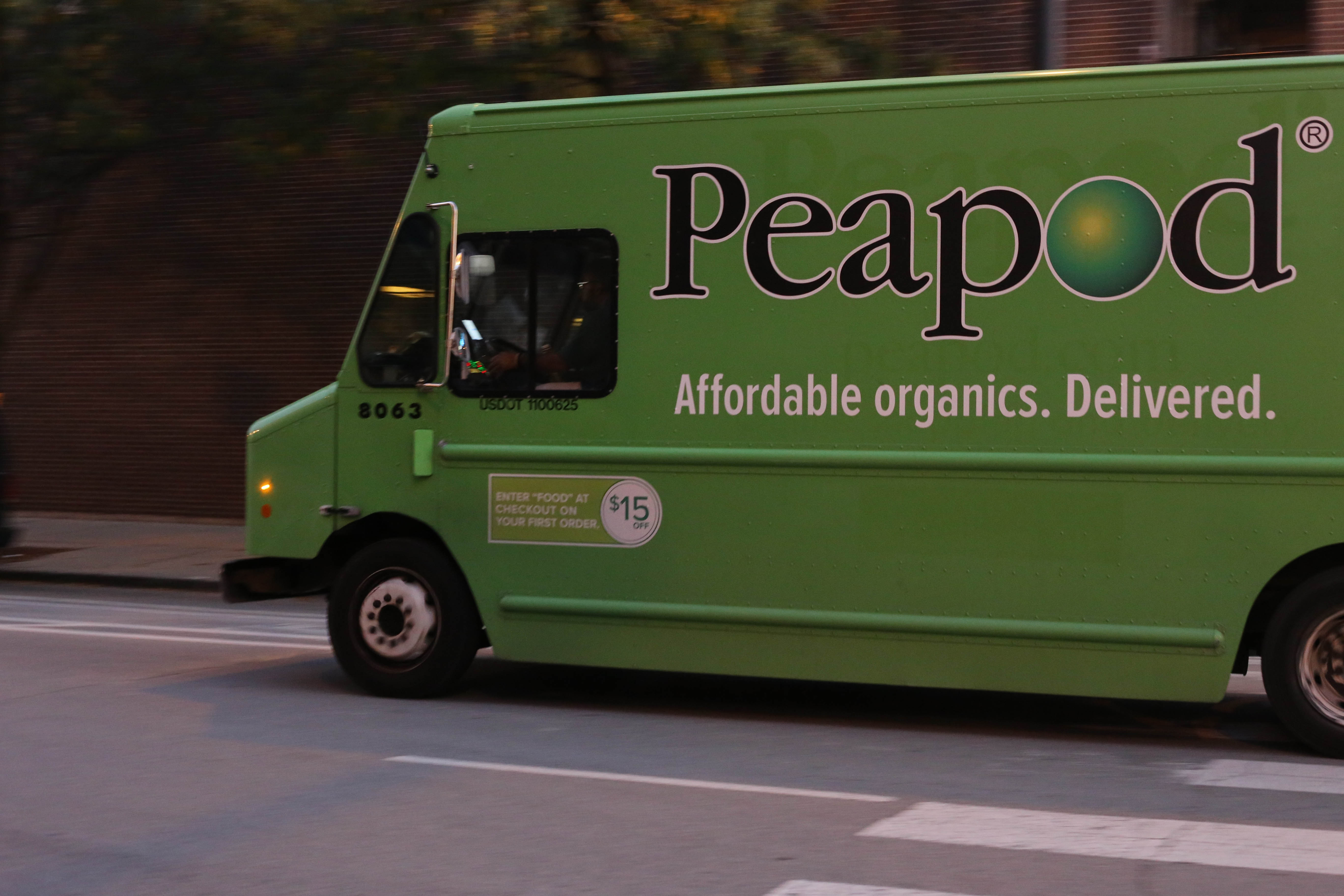 Peapod